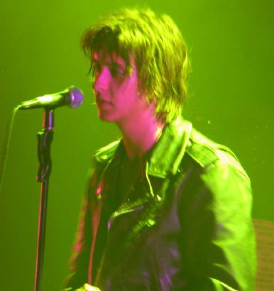 Julian Casablancas; modified.